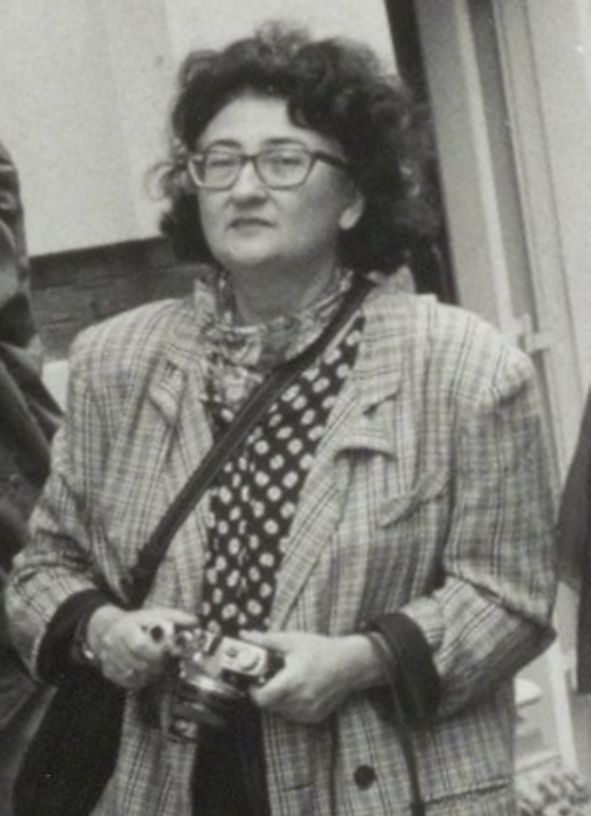 Dora Dolz, 1993